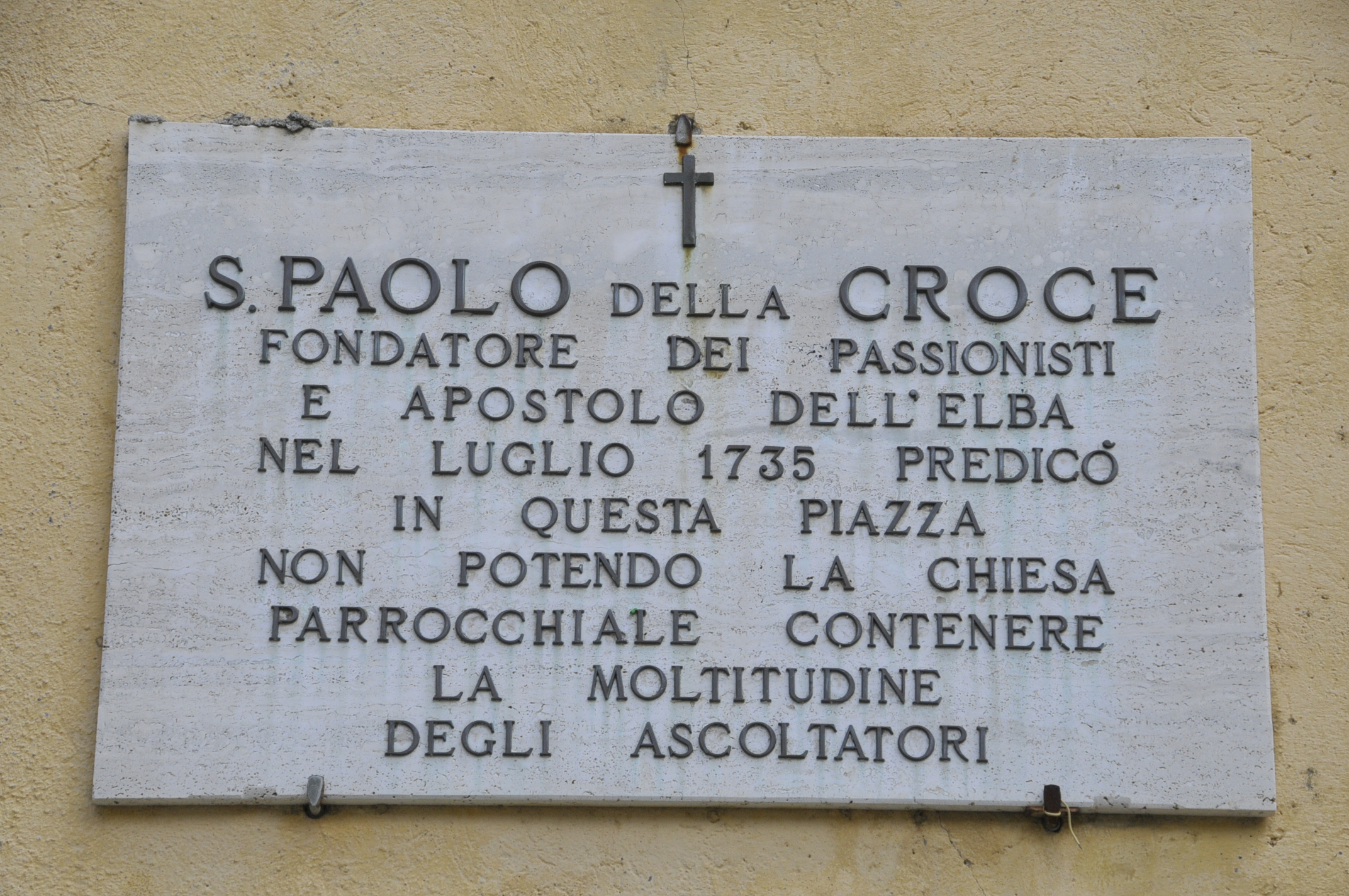 Gedenktafel für Paolo della Croce in Poggio (Elba)